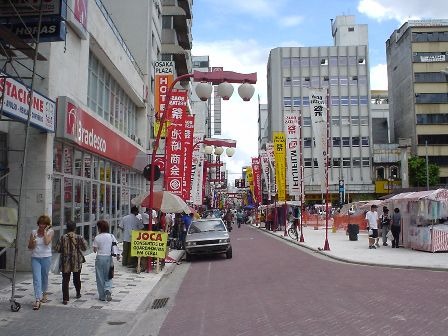 サンパウロのリベルダージ地区. 逆方向から見た画像.